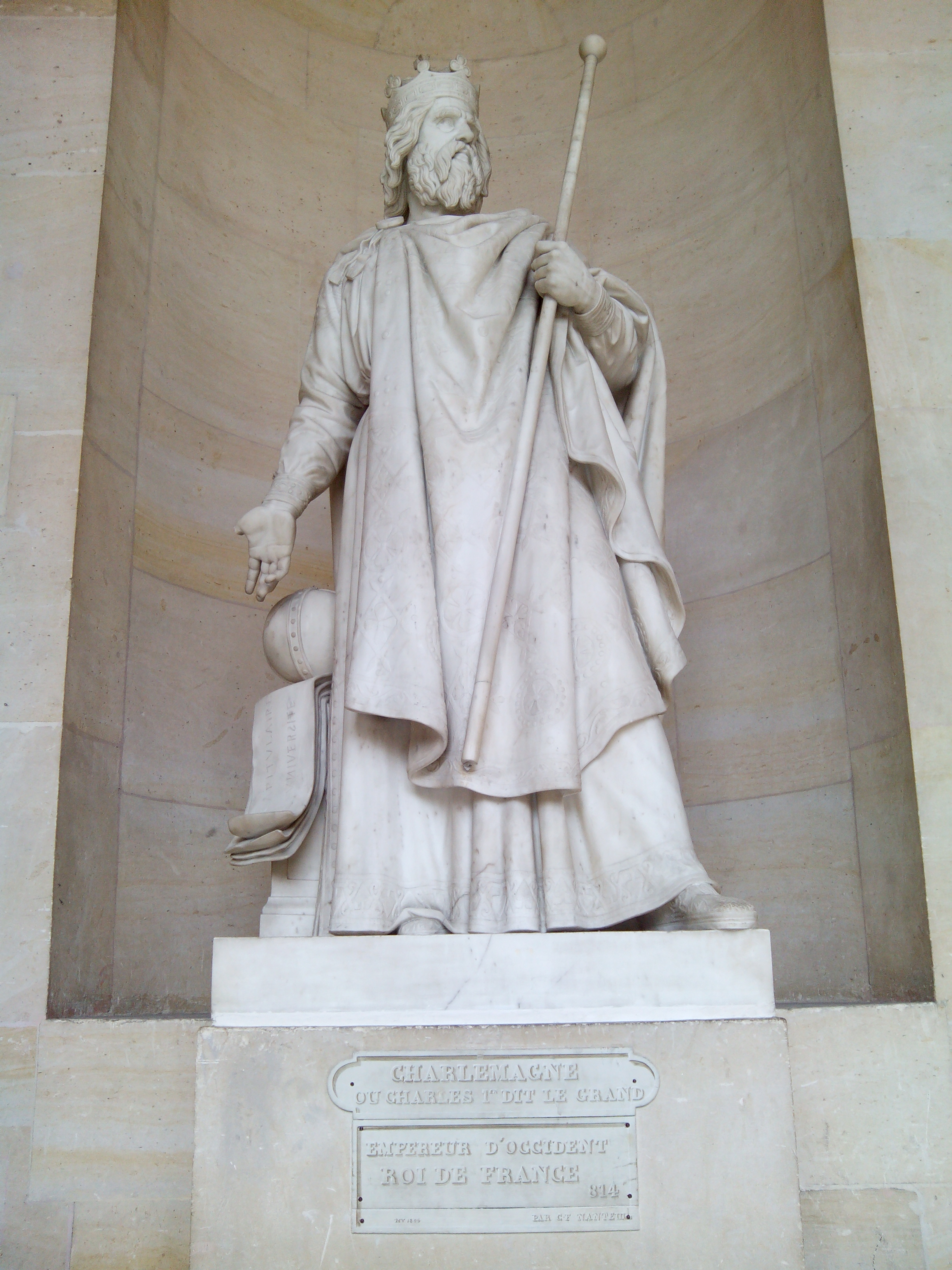 Fotografía realizada en el palacio de Versalles, agosto de 2014